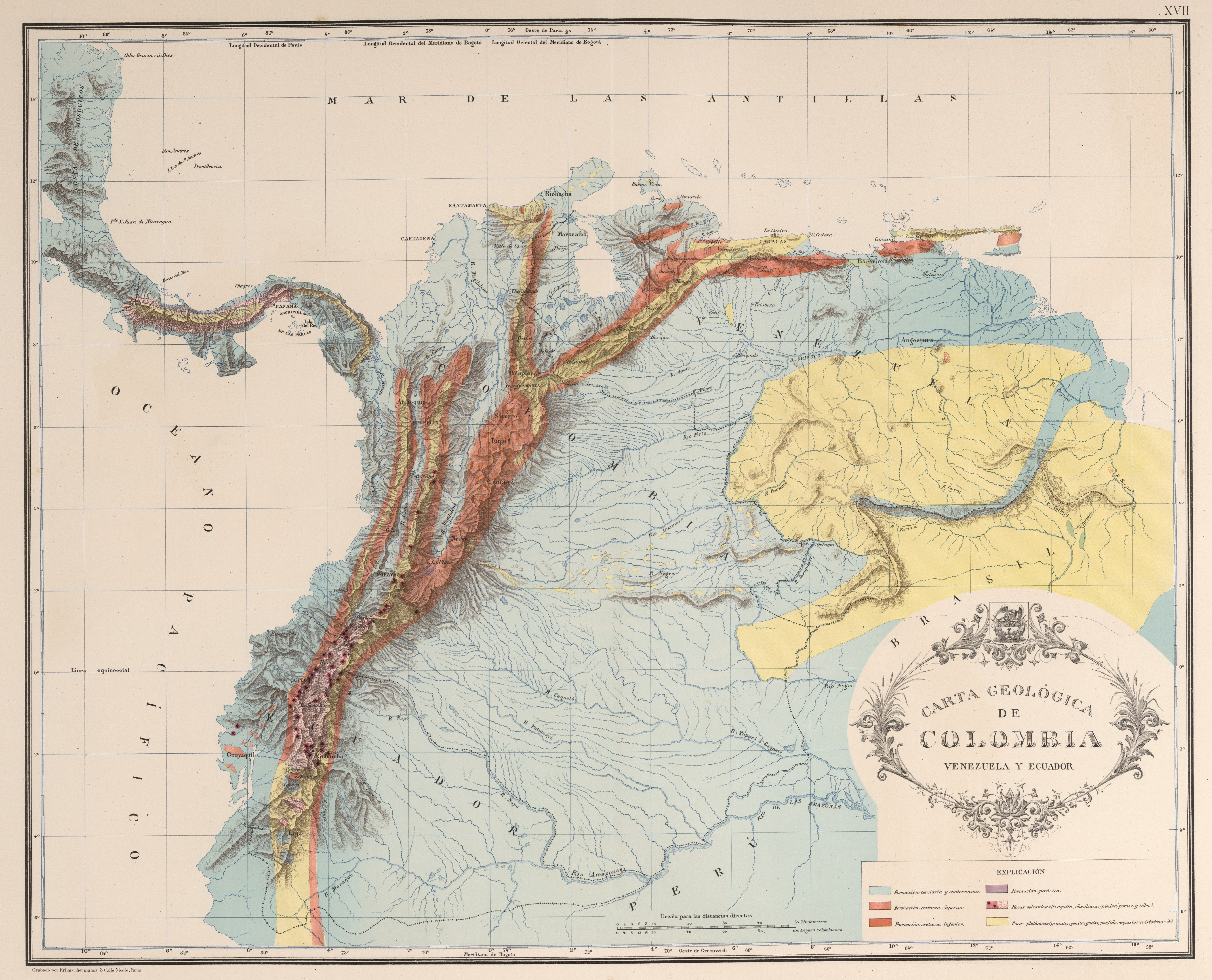 Carta geológica de Colombia, Venezuela y Ecuador. Carta XVII del Atlas geográfico e histórico de la República de Colombia, 1890.